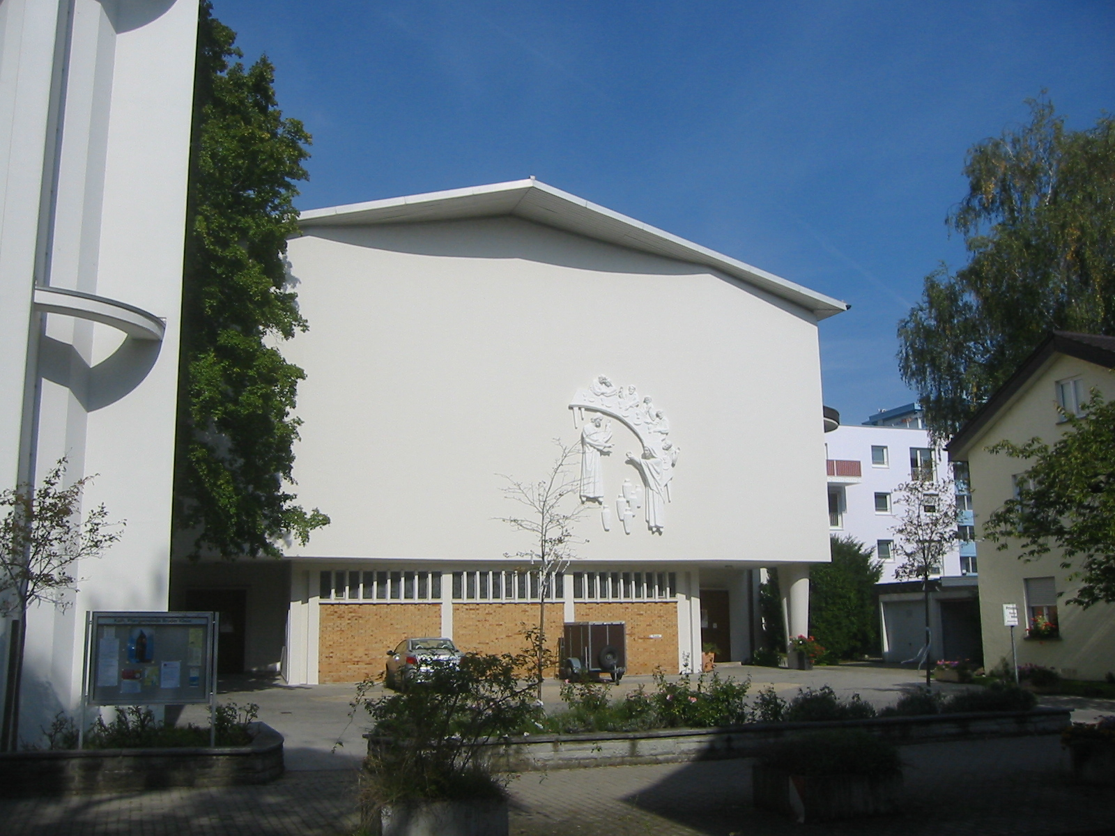 Bruder-Klaus-Kirche in Konstanz am Bodensee